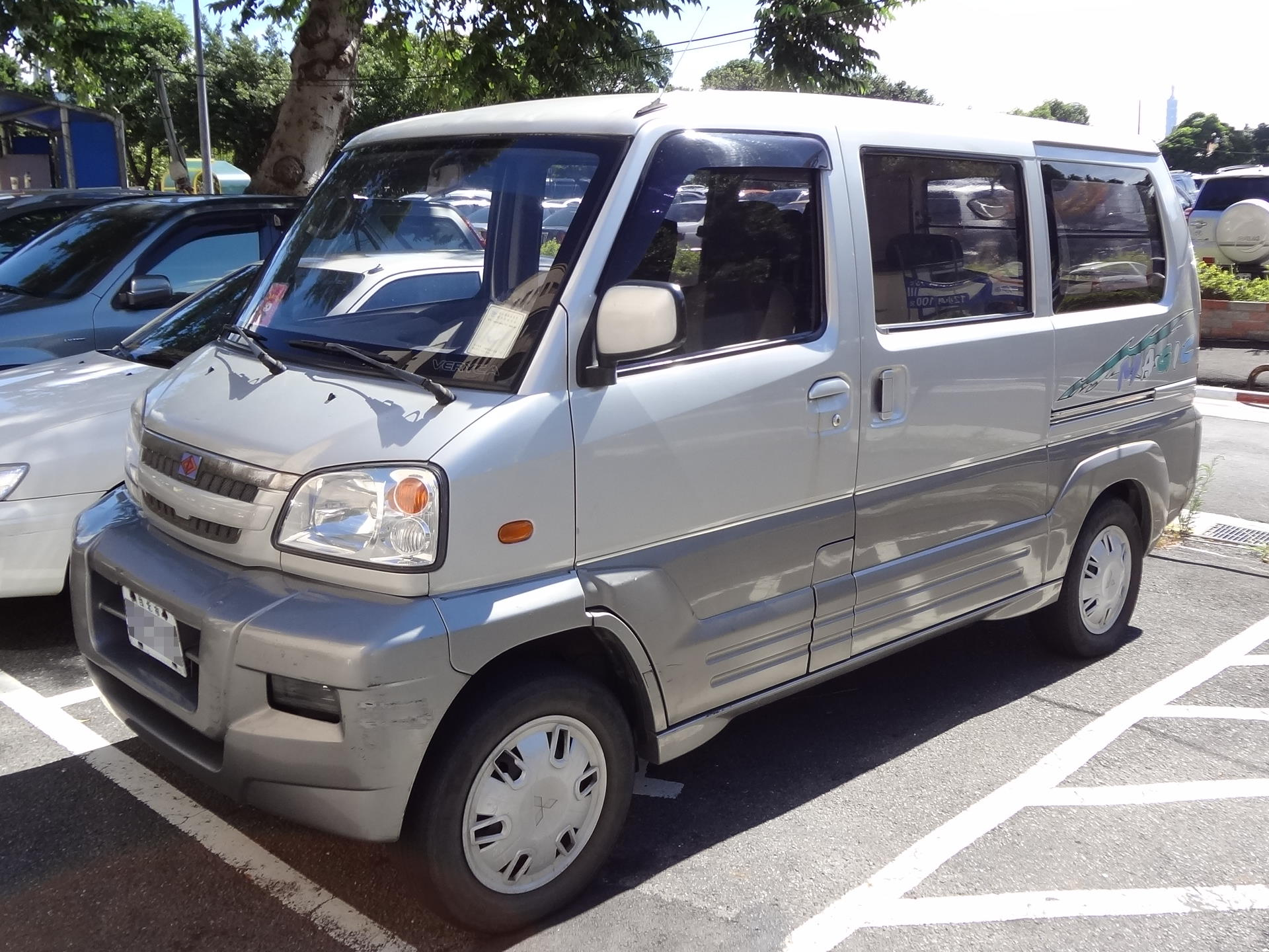 中華菱利Magic左前方外觀。